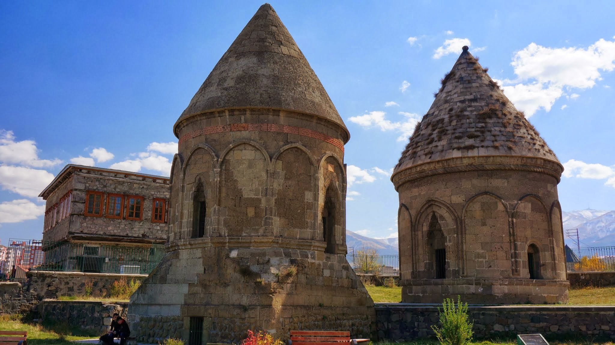 Erzurum, Turkey